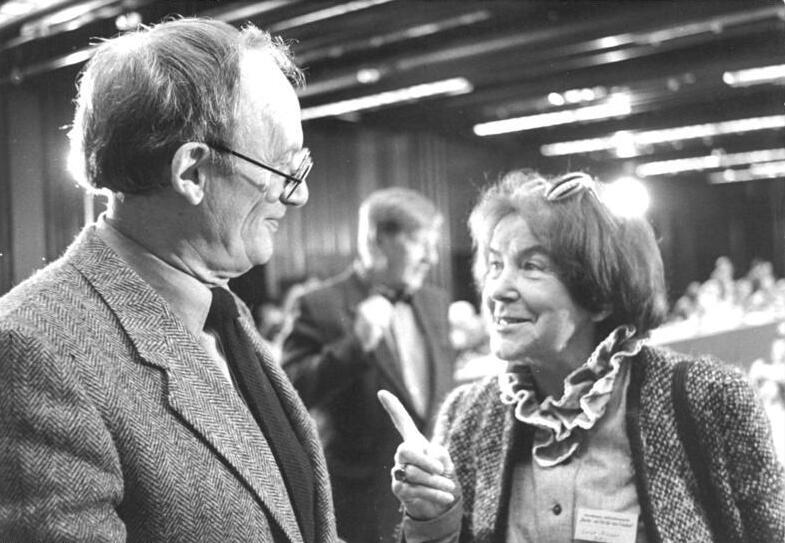 ADN-ZB Senft 14.7.87 Berlin: Internationales Schriftstellergespräch "Berlin - ein Ort für den Frieden" im Mai 1987 - Unter den Teilnehmern waren Hermann Kant, Präsident des Schriftstellerverbandes der DDR, und die BRD-Autorin Luise Rinser.